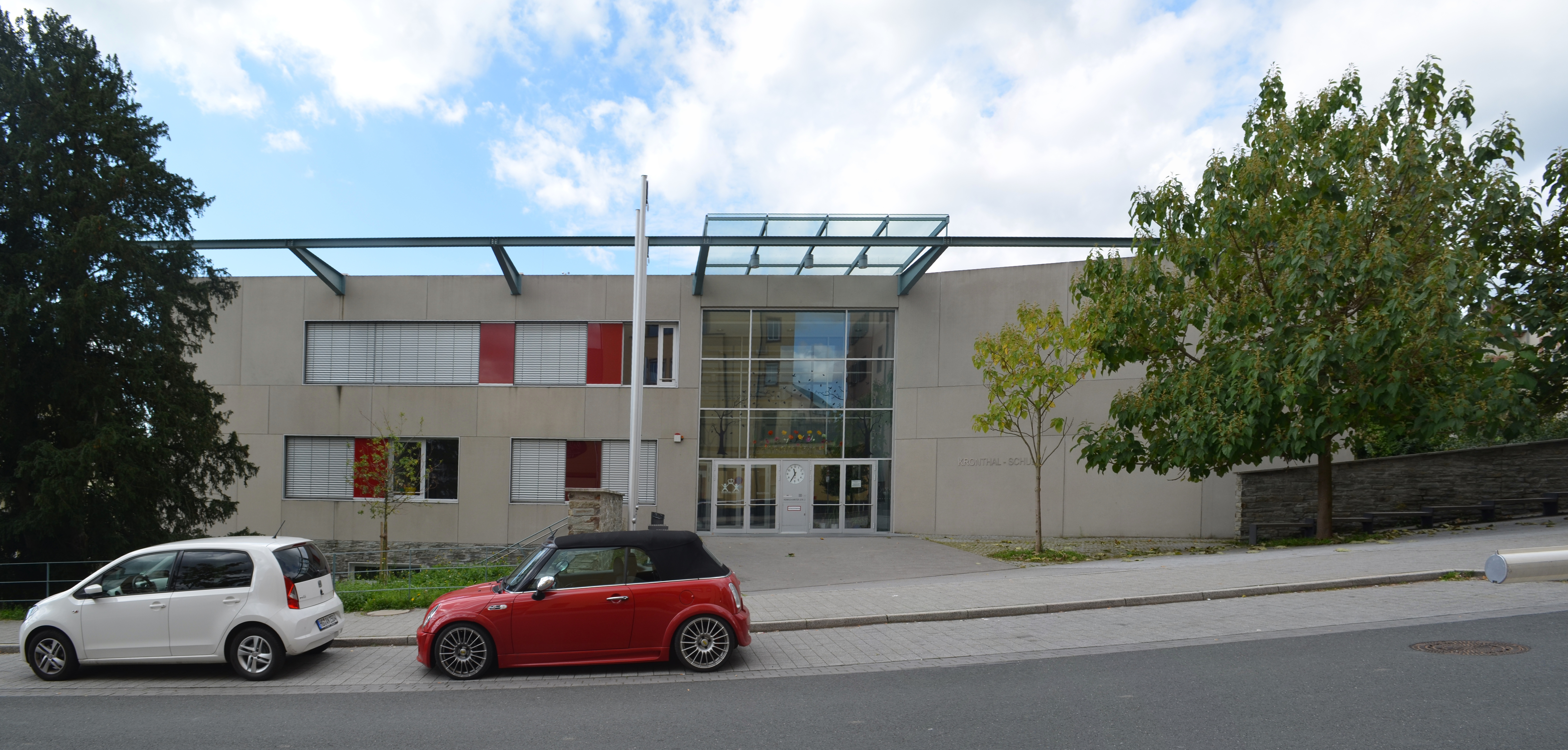 Kronberg, Kronthal-Schule